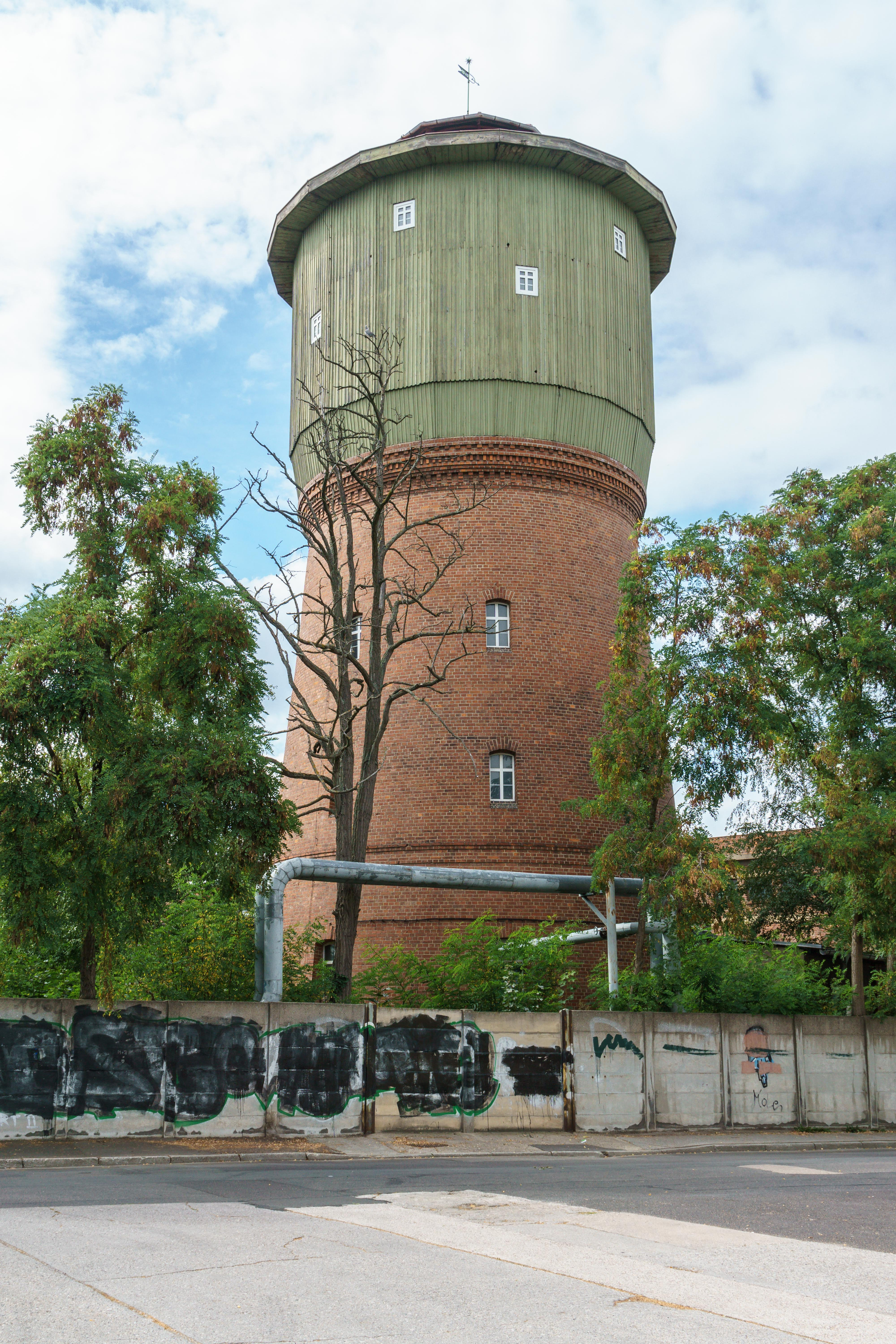 Wasserturm im ehemaligen Ausbesserungswerk Delitzsch, Karl-Marx-Straße 39